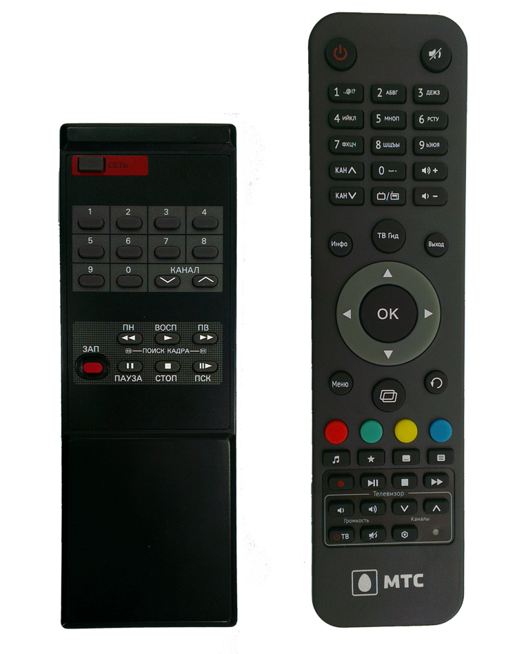 Редкий пример пультов ДУ на Русском языке. Слева пульт от советского видео магнитофона Электроника ВМЦ-8220 (1987г.), справа пульт от цифровой тв приставки МТС (2013г.)